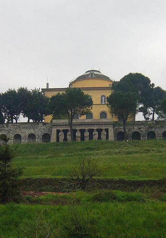 Inverigo